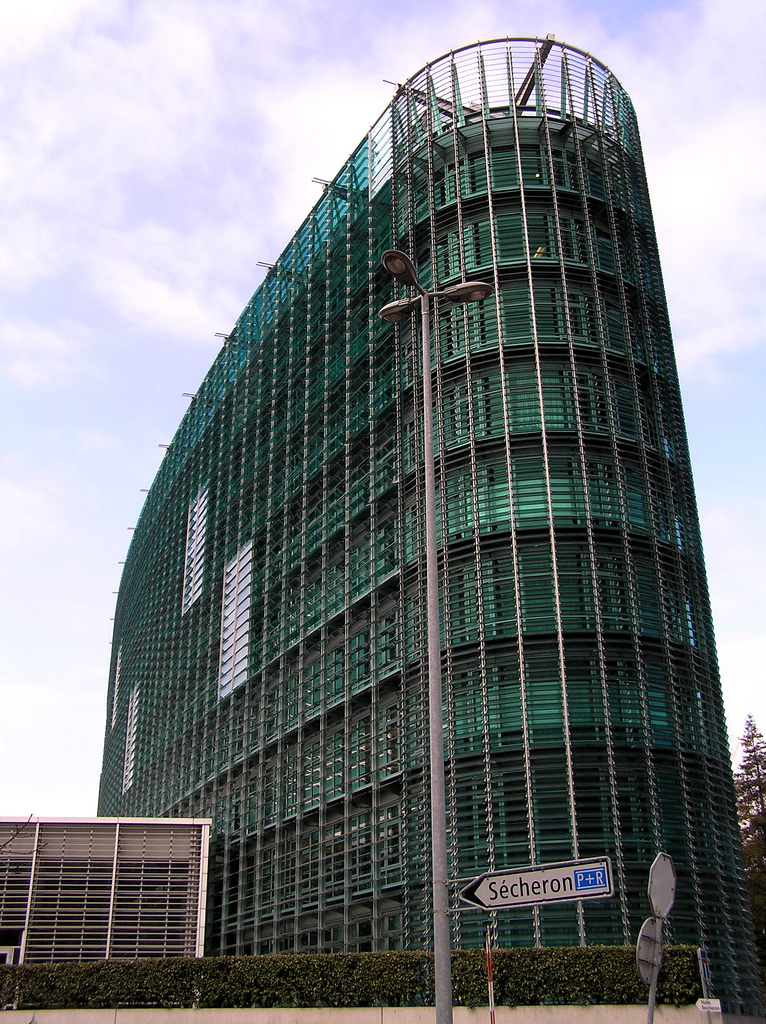 Светската метеоролошка организација WMO